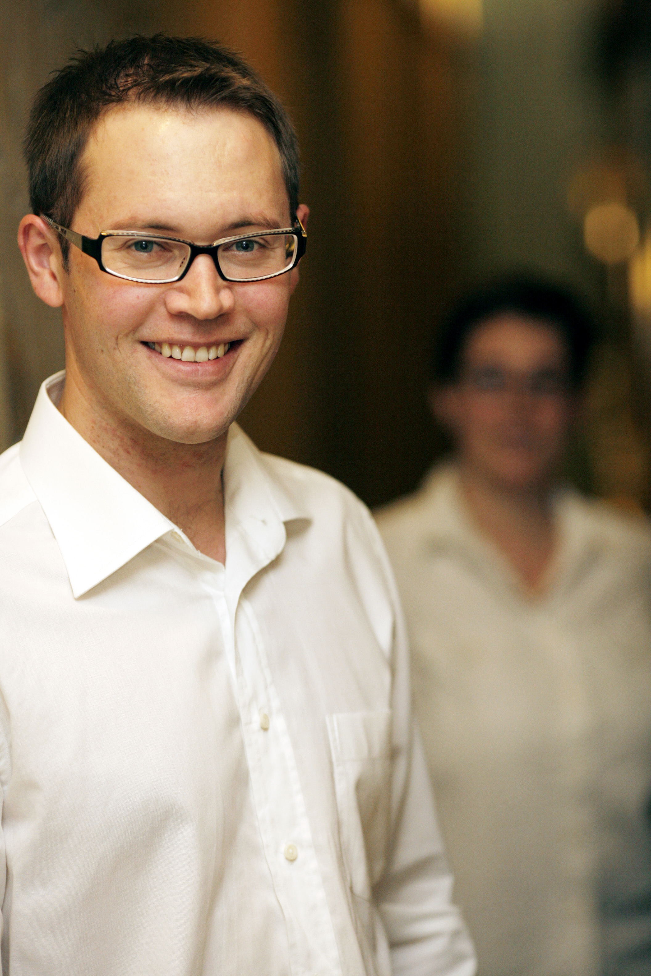 Iby Toni